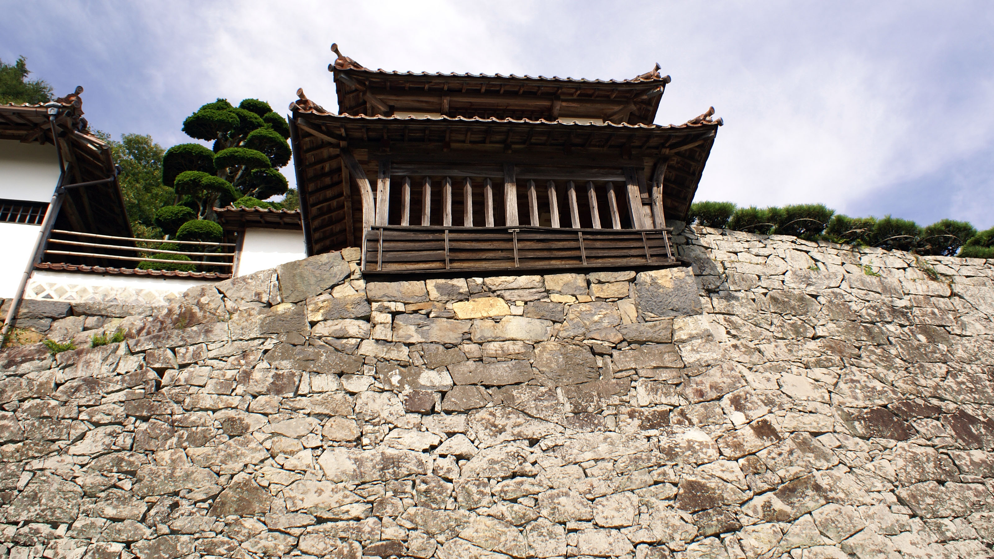 Hirokane house in Takahashi, Okayama, Japan